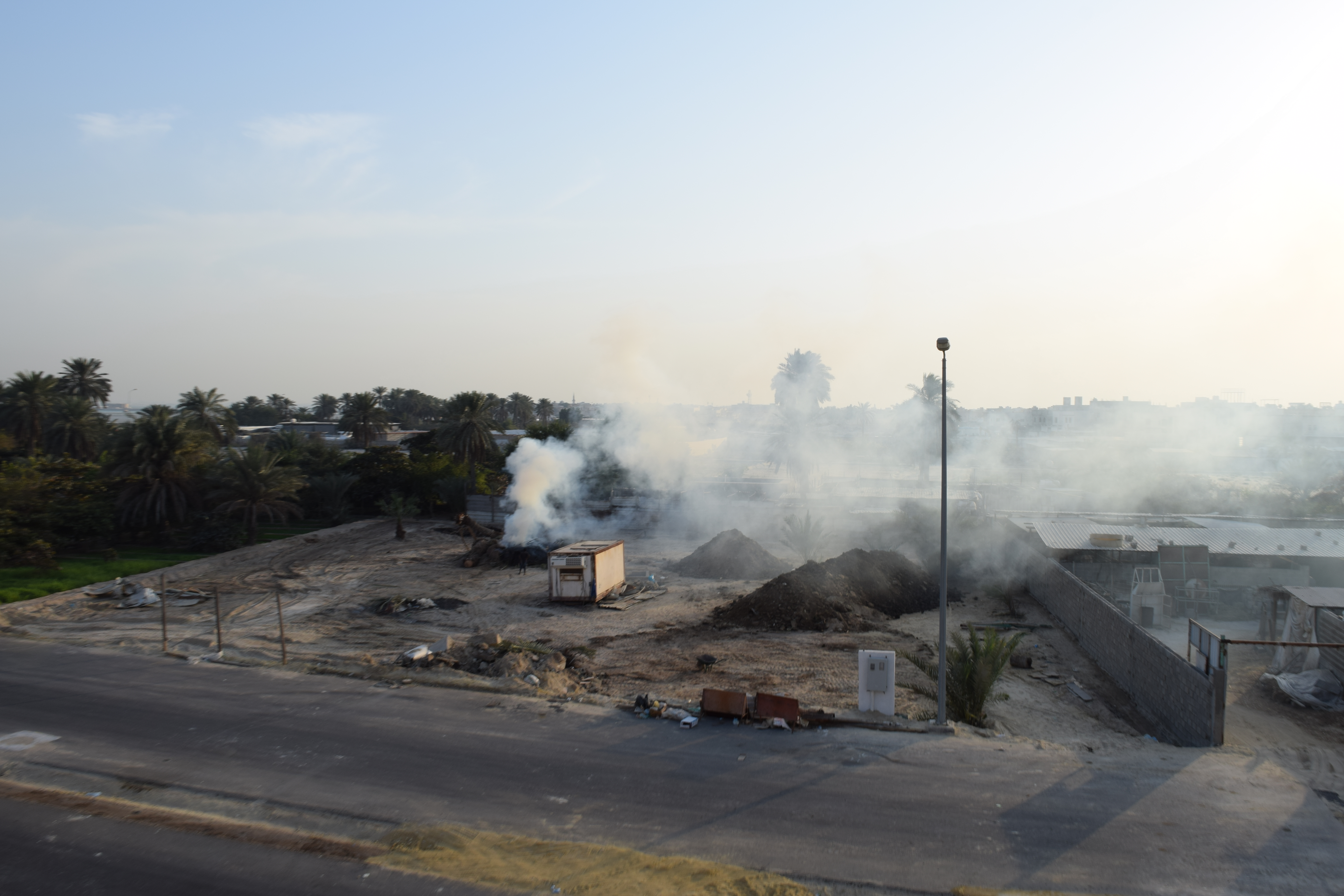 جانب من حرق نخيل مزرعة لتحويلها إلى أرض سكنية، شرق جزيرة تاروت، يناير، 2017م.